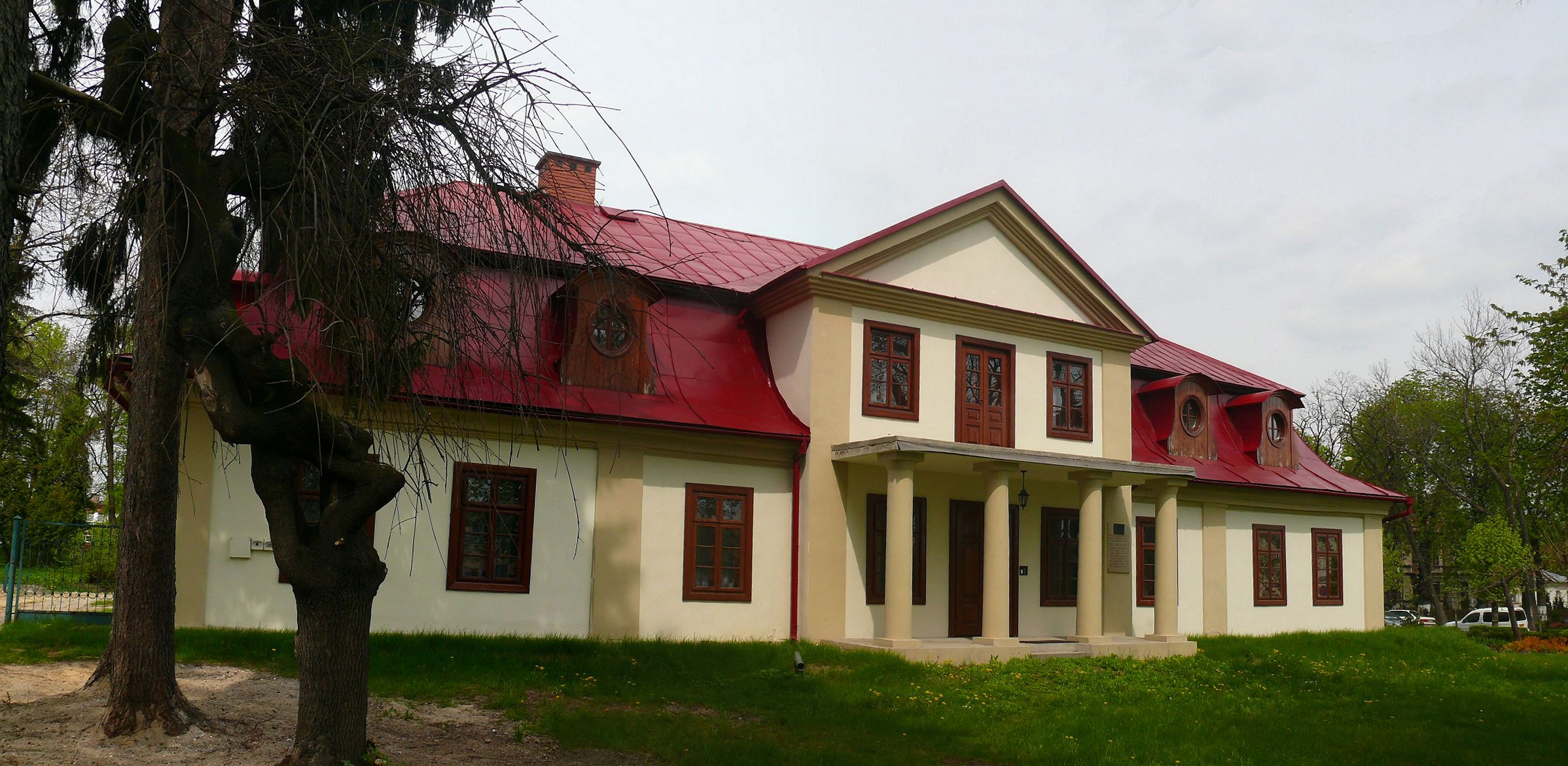 dom Bolesława Prusa w Hrubieszowie